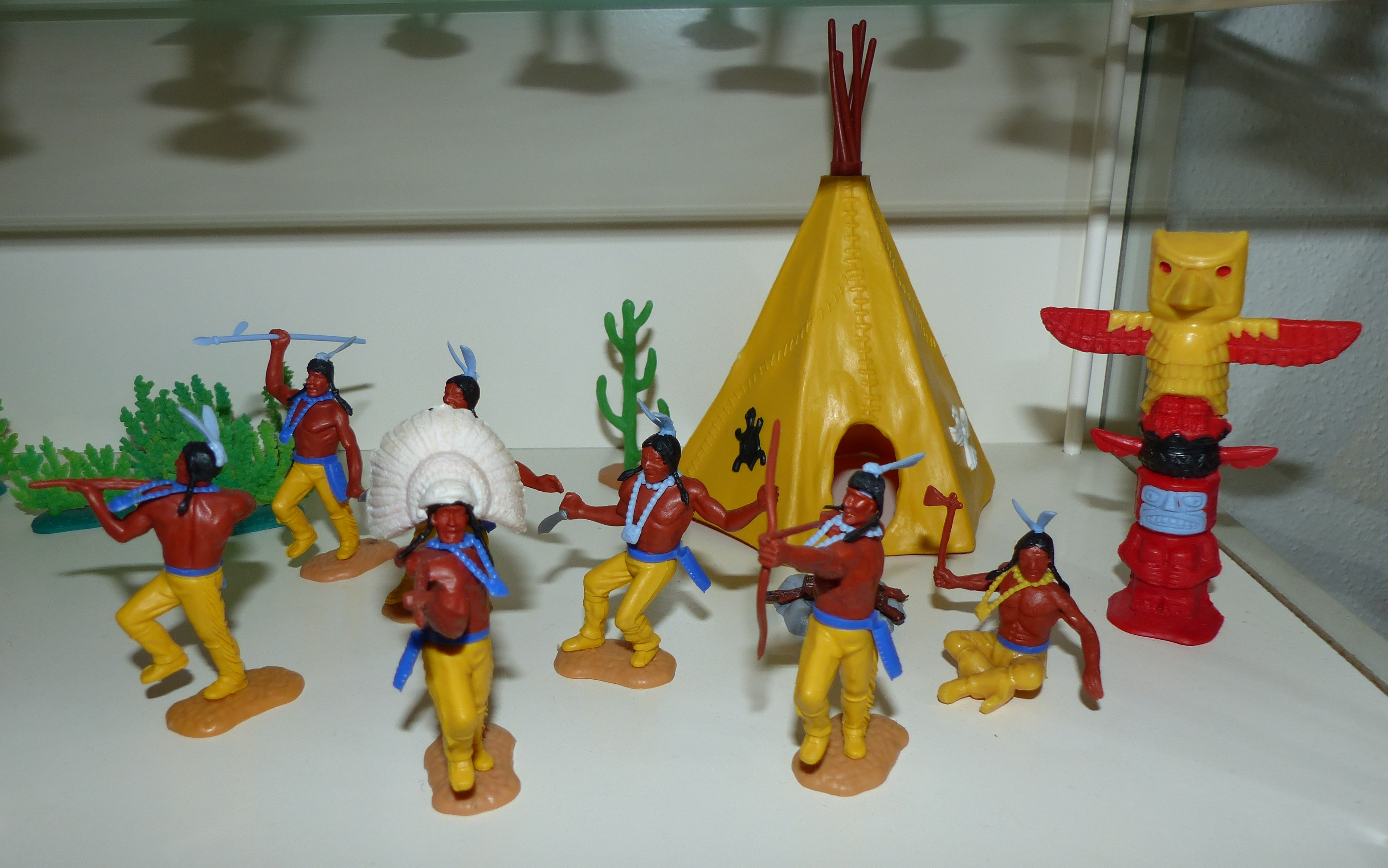 Kunststofffigur der Firma Timpo Toys